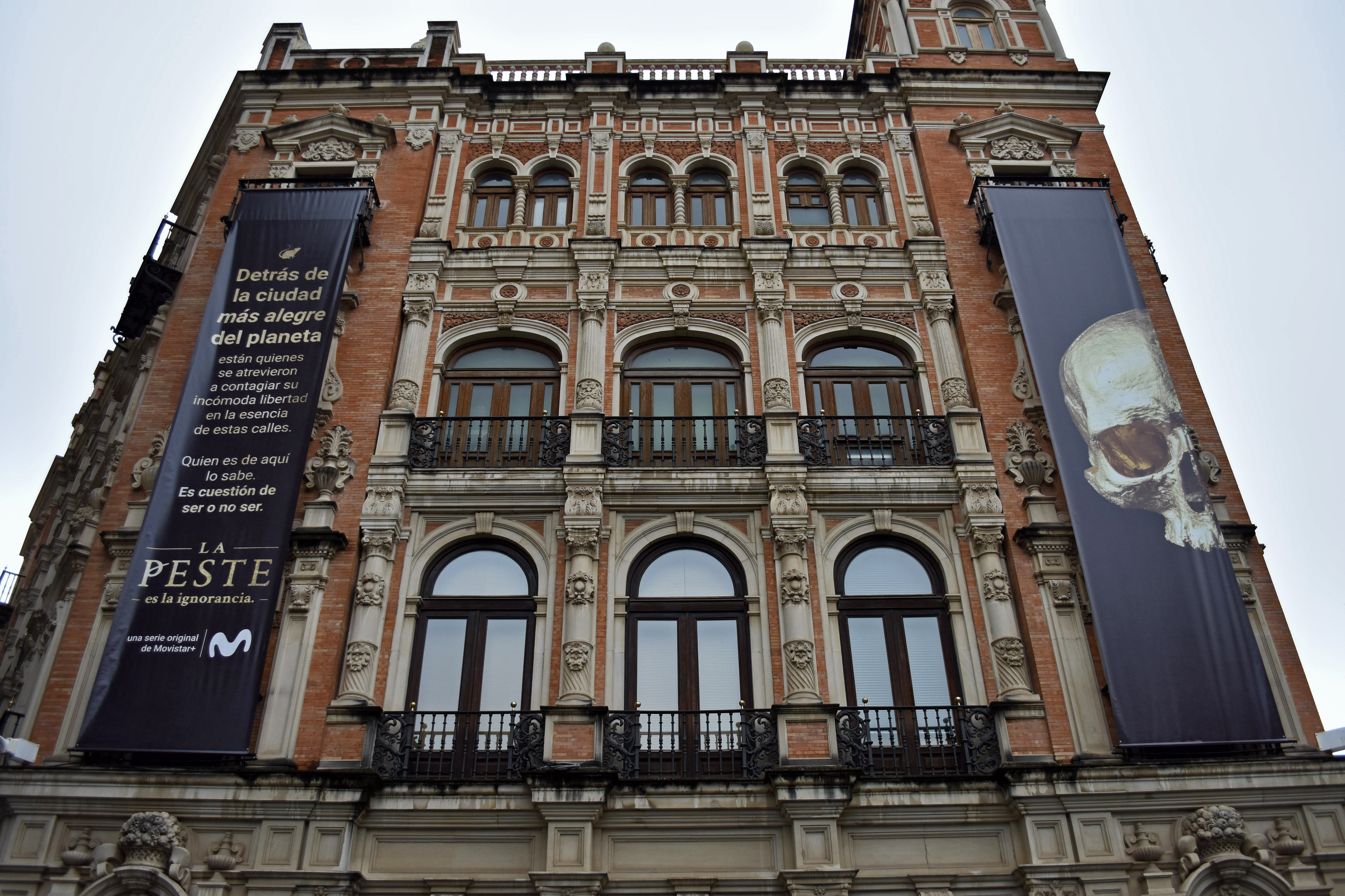 Edificio de Telefónica en la Plaza Nueva de Sevilla, diseñado por el arquitecto Juan Talavera y Heredia, con publicidad de la serie La peste.